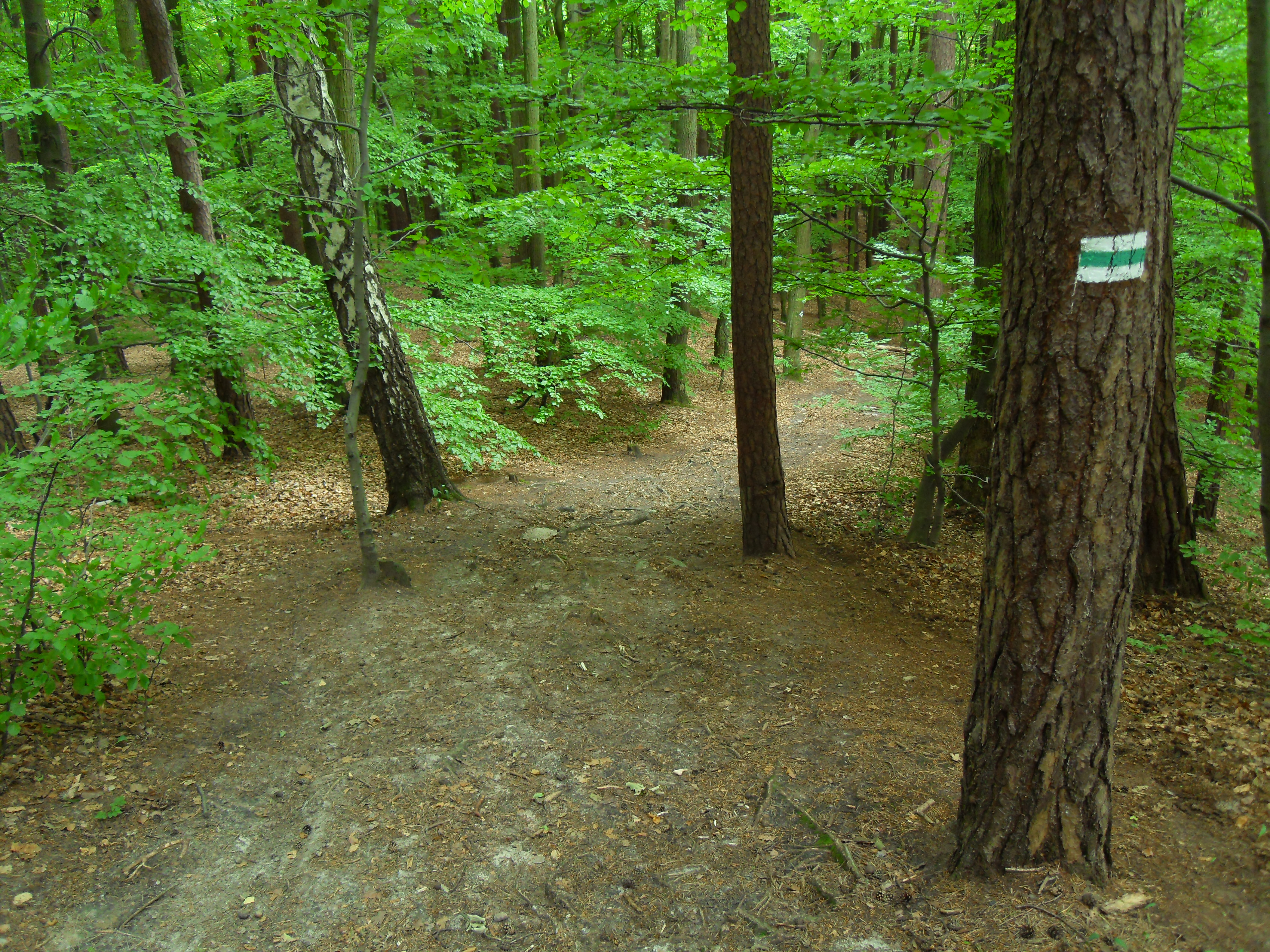 Gdańsk Oliwa, Lasy Oliwskie (Trójmiejski Park Krajobrazowy). Szlak Skarszewski, zielony szlak turystyczny.